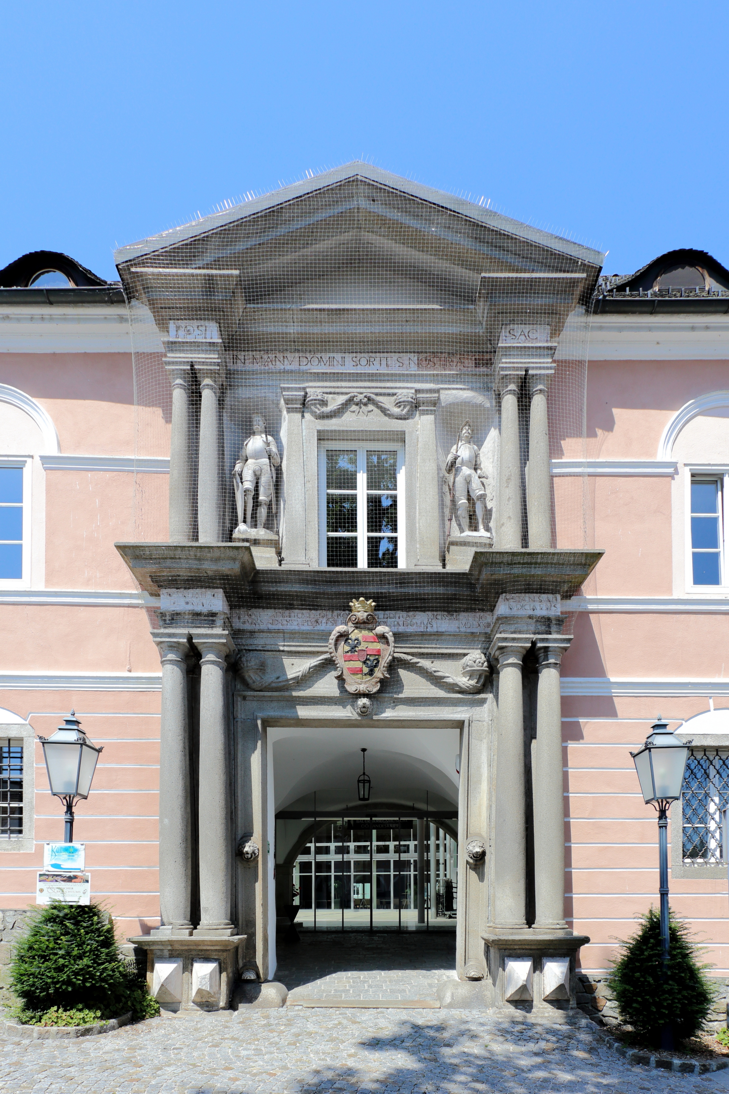 Portal des ehemaligen Schlosses in der oberösterreichischen Stadt Peuerbach. Ein zweigeschossiges Renaissance-Portal mit zwei Ritterstatuen und einer Wappenkartusche aus dem dritten Viertel des 17. Jahrhunderts.